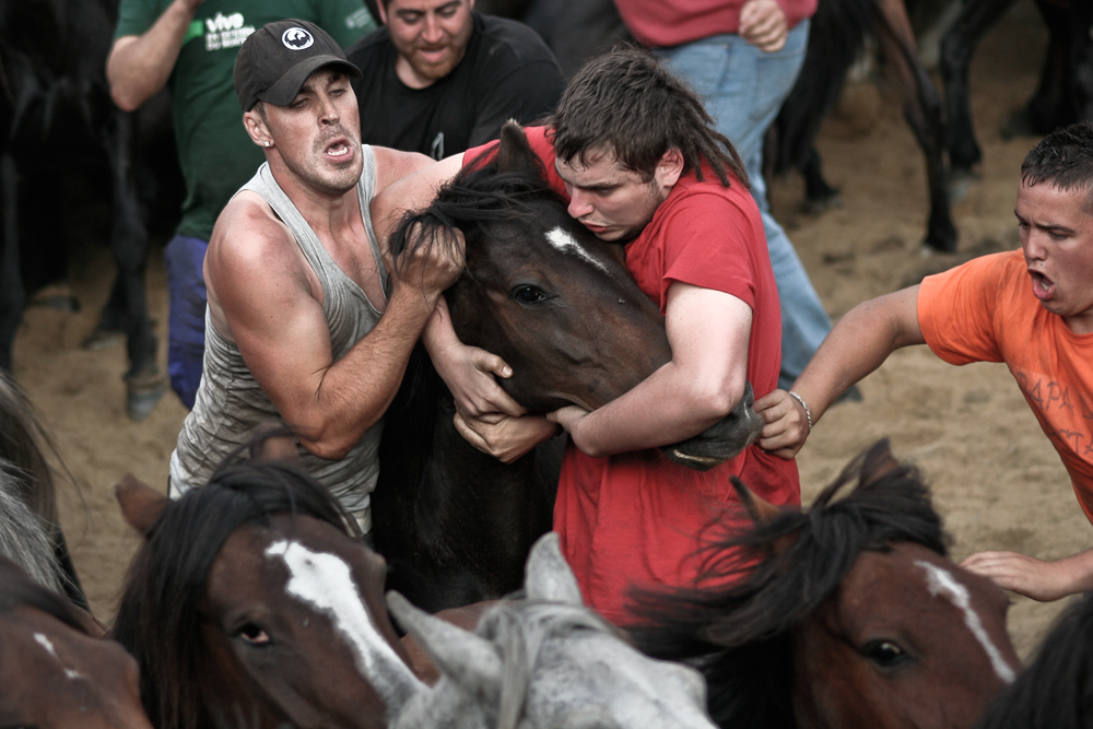 A rapa das bestas de Sabucedo - Traballo en equipo